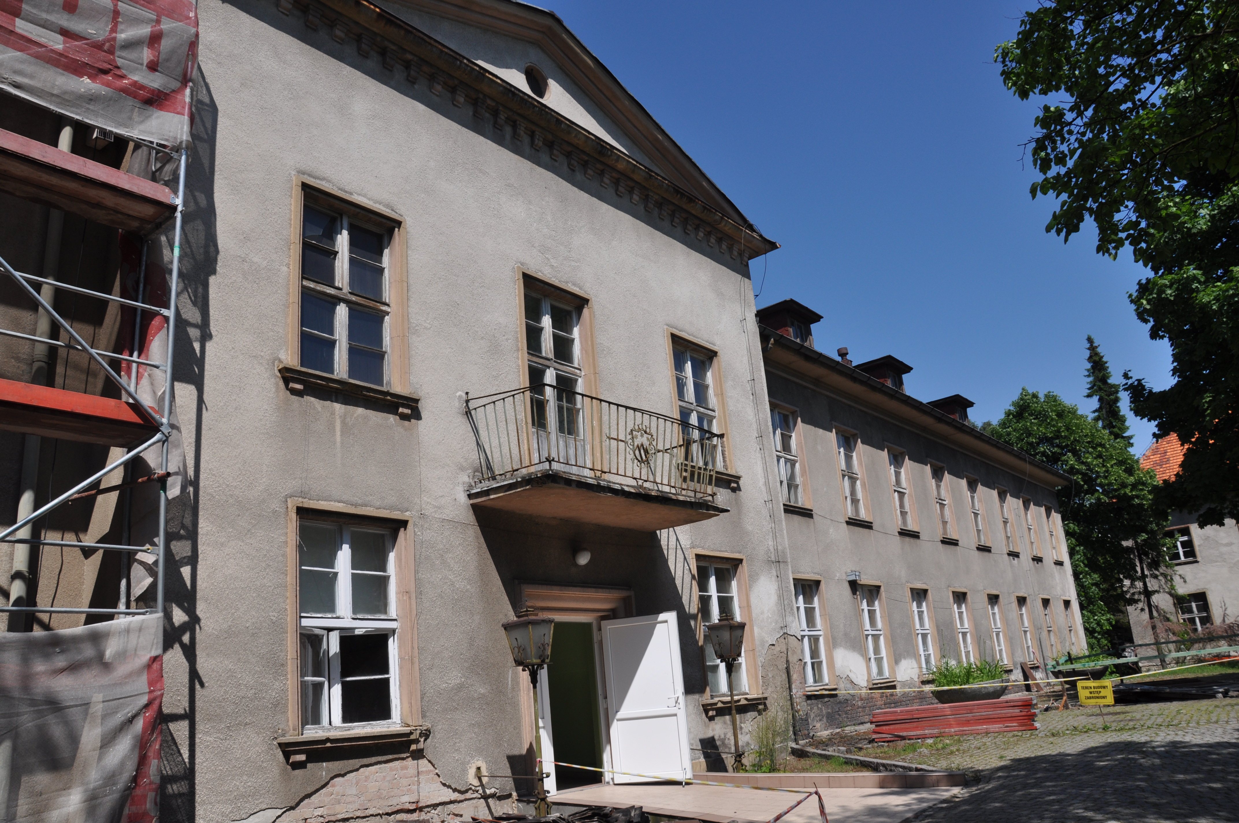 Dawne koszary w Torzymiu